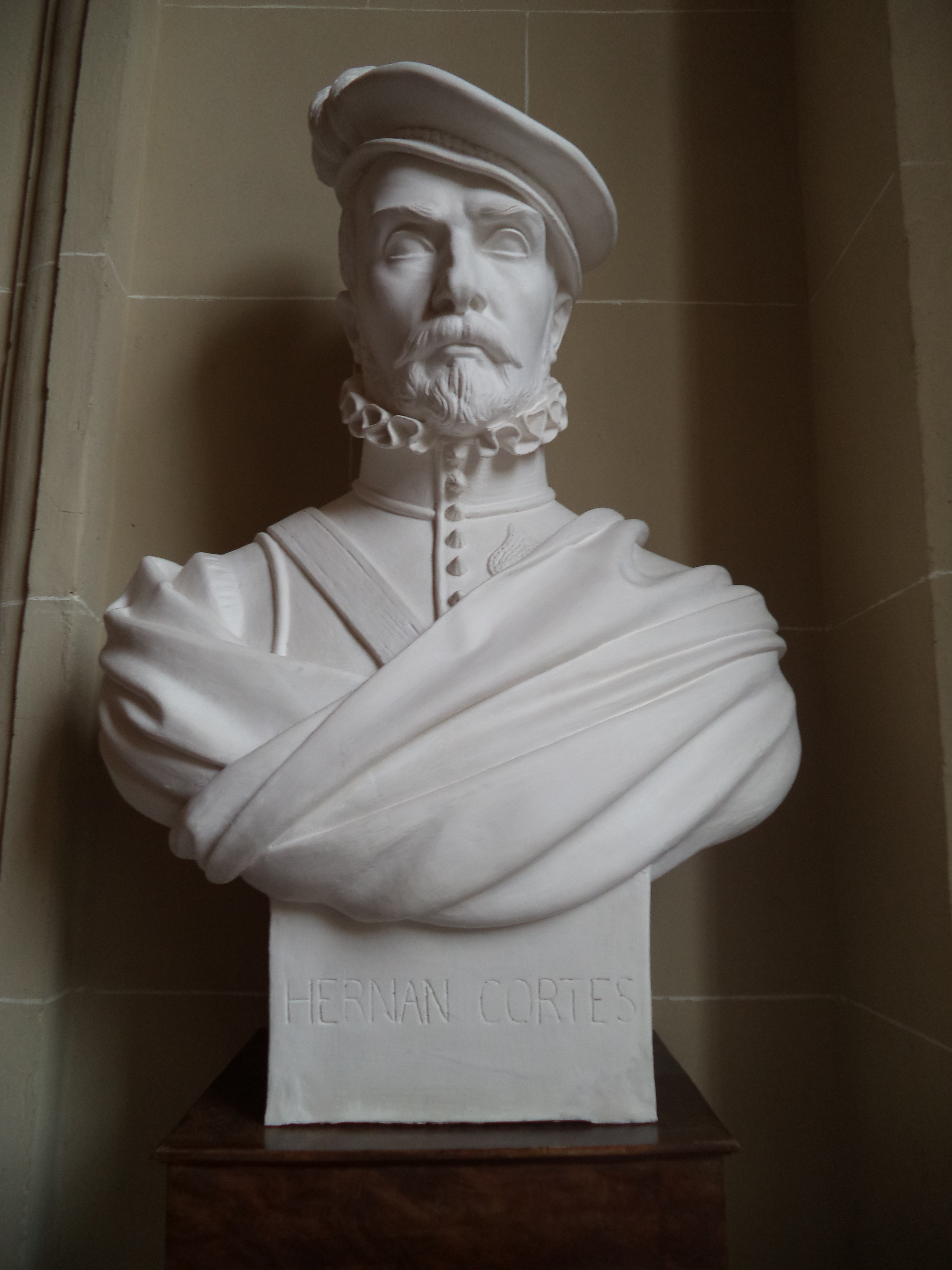 Busto de Hernán Cortés en el Archivo de Indias de Sevilla